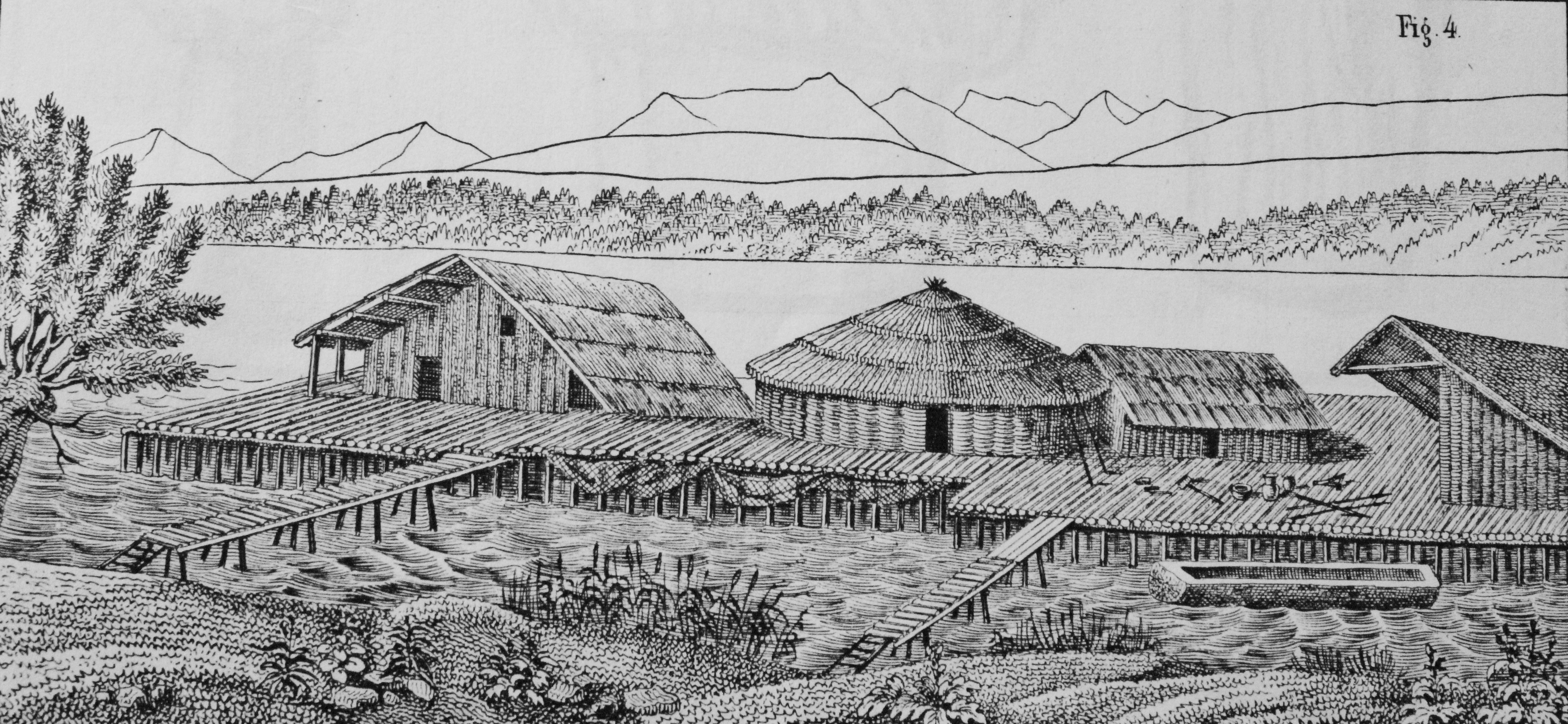 Interprétation de Ferdinand Keller suite à ses découvertes lacustres aux bords des lacs Suisses.